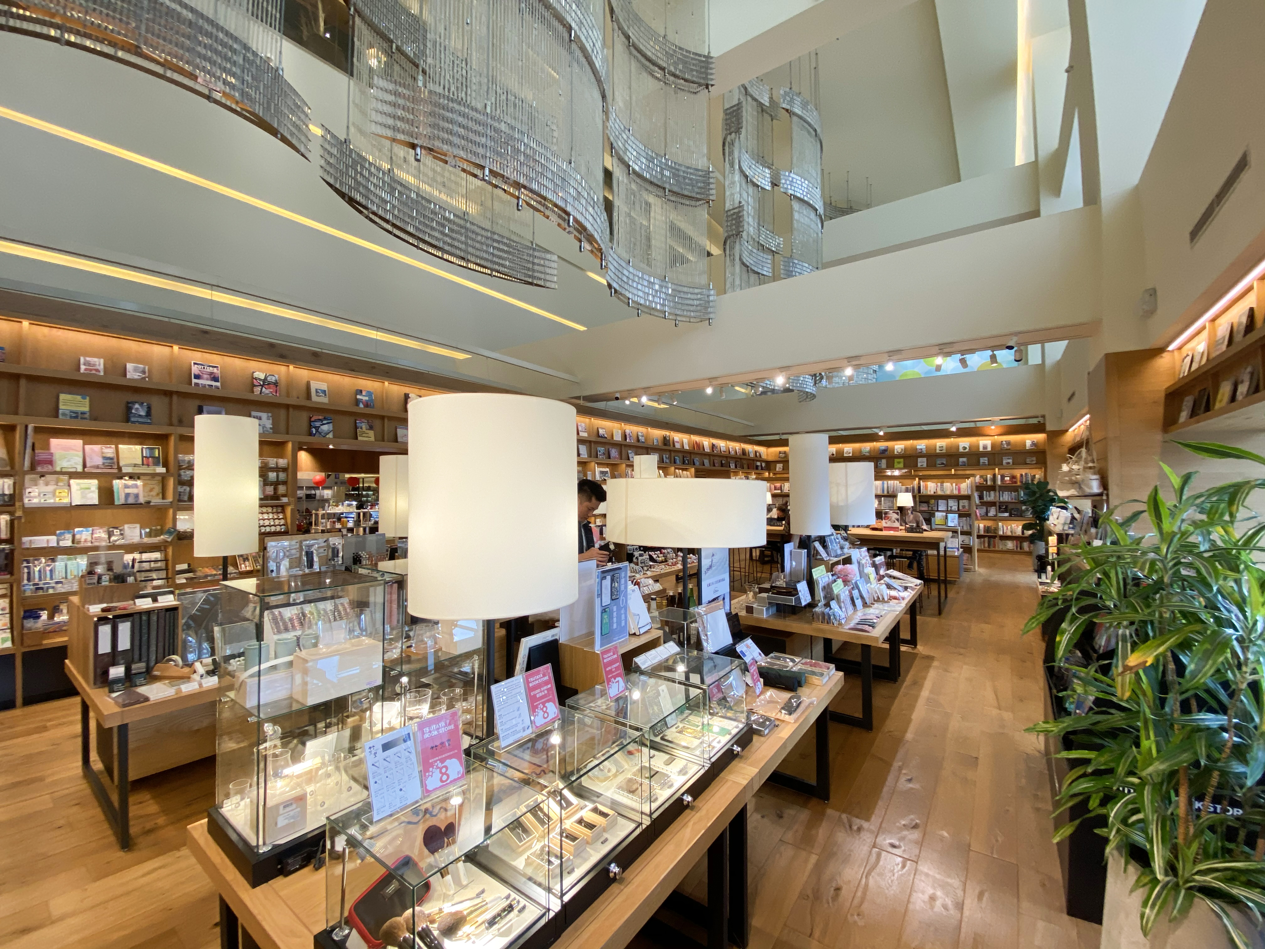 Uni-President Department Store Taipei Tsutaya Bookstore